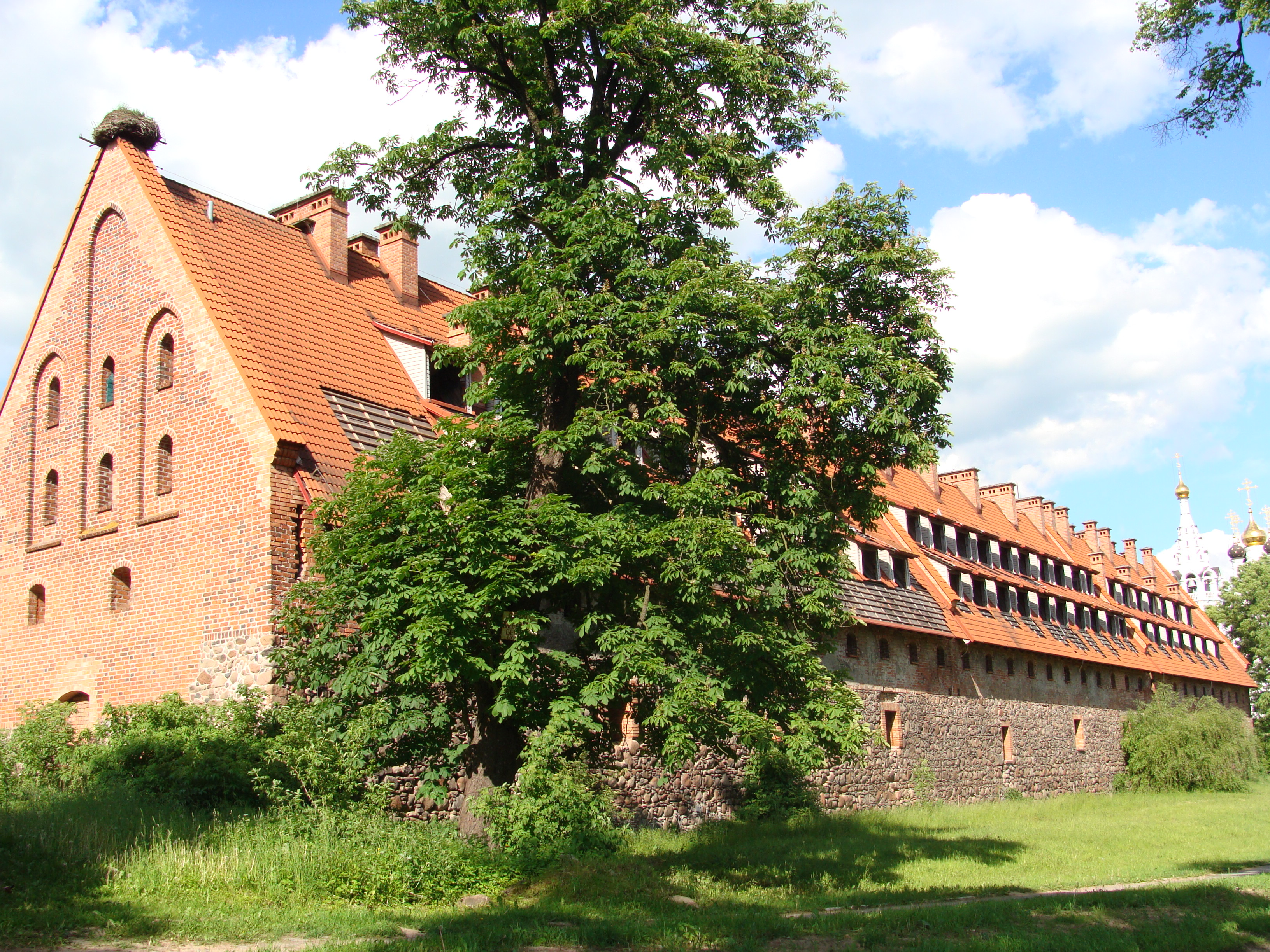 Немецкий рыцарский замок XIV века. Первое упоминание о замке-крепости - в орденских хрониках 1336 и 1339 годов под именем Иле, Иладия, Илав (это название, возможно, заимствовано из прусского языка и первоначально означало "тёмный"; появление приставки Пруше, Пройсиш перед Илав служило для отличия от крепости Дойч-Эйлау). Фотография сделана 05.06.2010 в Багратионовске (Калининградская область).